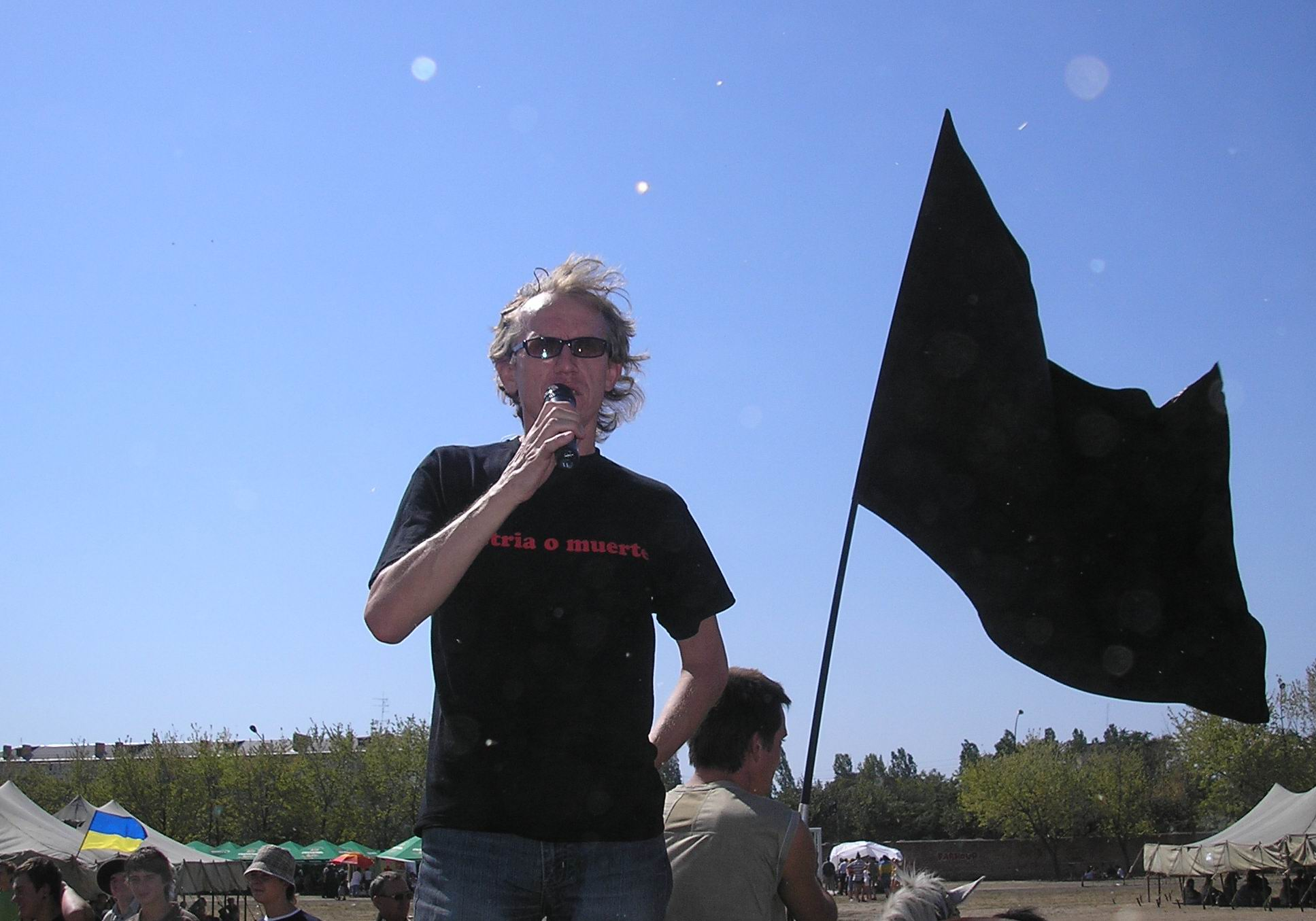 Олег Соловей на фестивалі у Гуляйполі, 24 серпня 2007